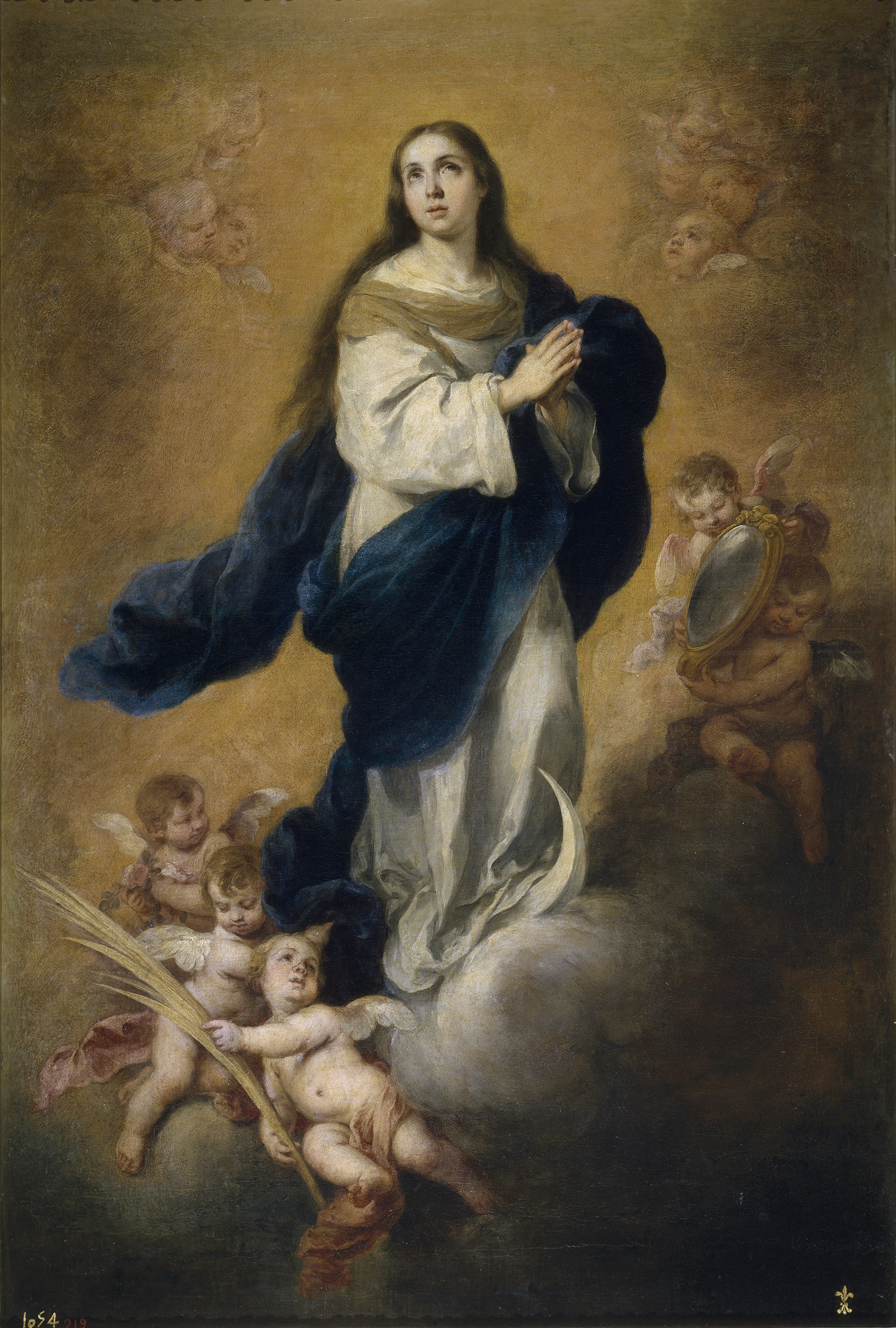 Esta es una de las Inmaculadas pintadas por Bartolomé Esteban Murillo que se conservan en el Museo del Prado.